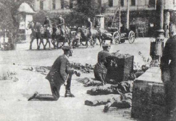 Atak wojsk Piłsudskiego podczas przewrotu majowego 1926 r. w okolicach warszawskich Alej Jerozolimskich.